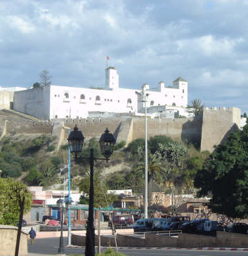 Monument dit "Bureau arabe", datant des Saadiens, actuellement Musée de la potterie (en blanc, au-dessus); plus bas : enceinte du temps des Almohades; photo prise de "Bab Chaaba"